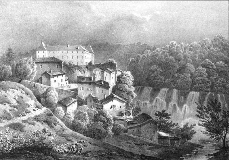 Album du Dauphiné - tome IV, litographie de Alivet, vallon du Furon. Renage.